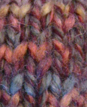 Stockinette stitch knitting (detail of Image:556165_5691fcfdcb.jpg